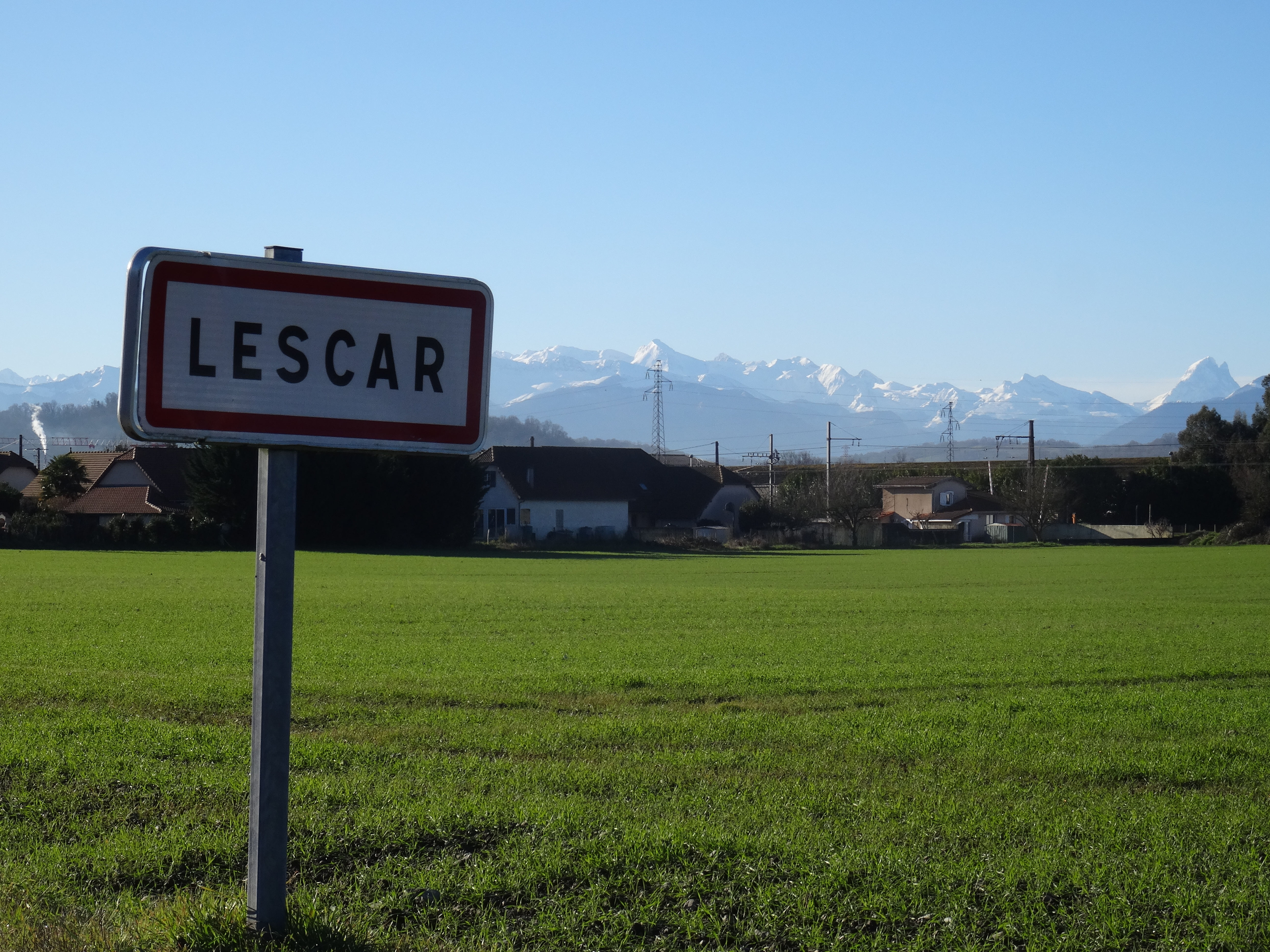 Panneau d'entrée de Lescar